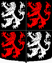 Gemeentewapen Uitgeest